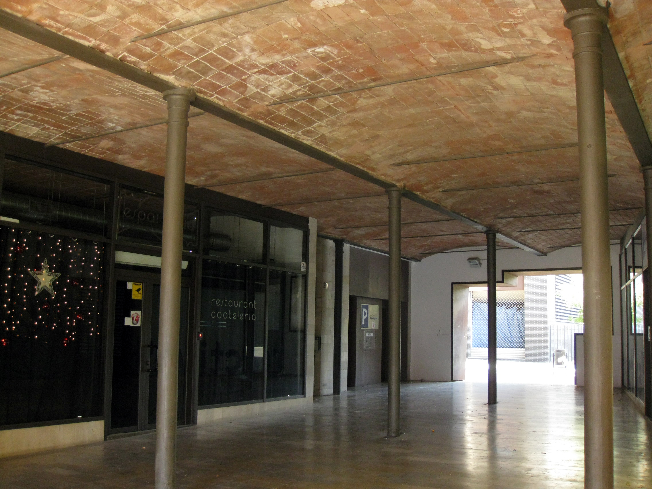 Nau de l'antic Vapor Gran (Terrassa)